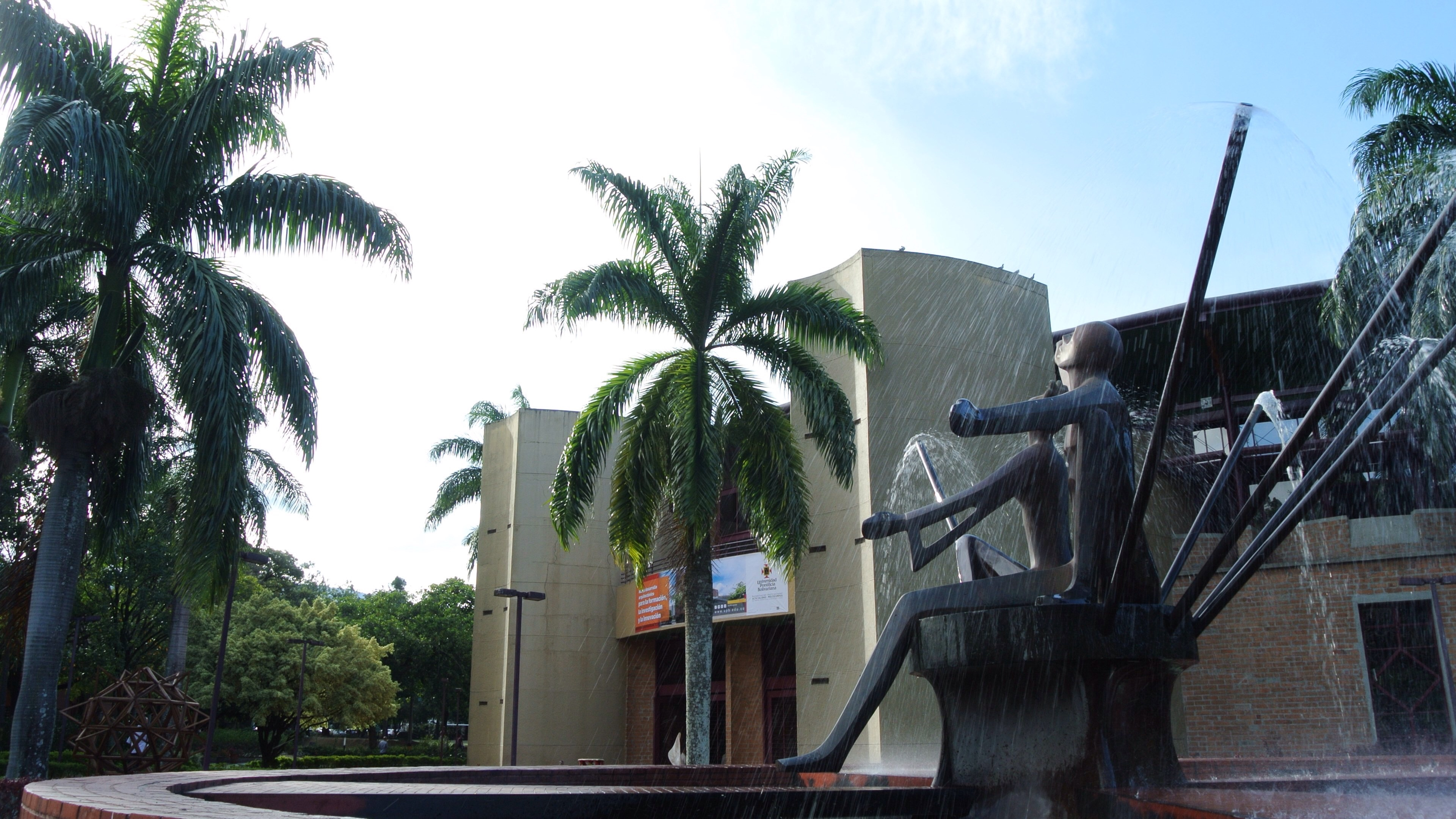 Edificio de la Rectoría general de la UPB (Campus Laureles, Medellin).